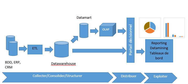 Ce schéma représente les différents composants du systèmes BI.